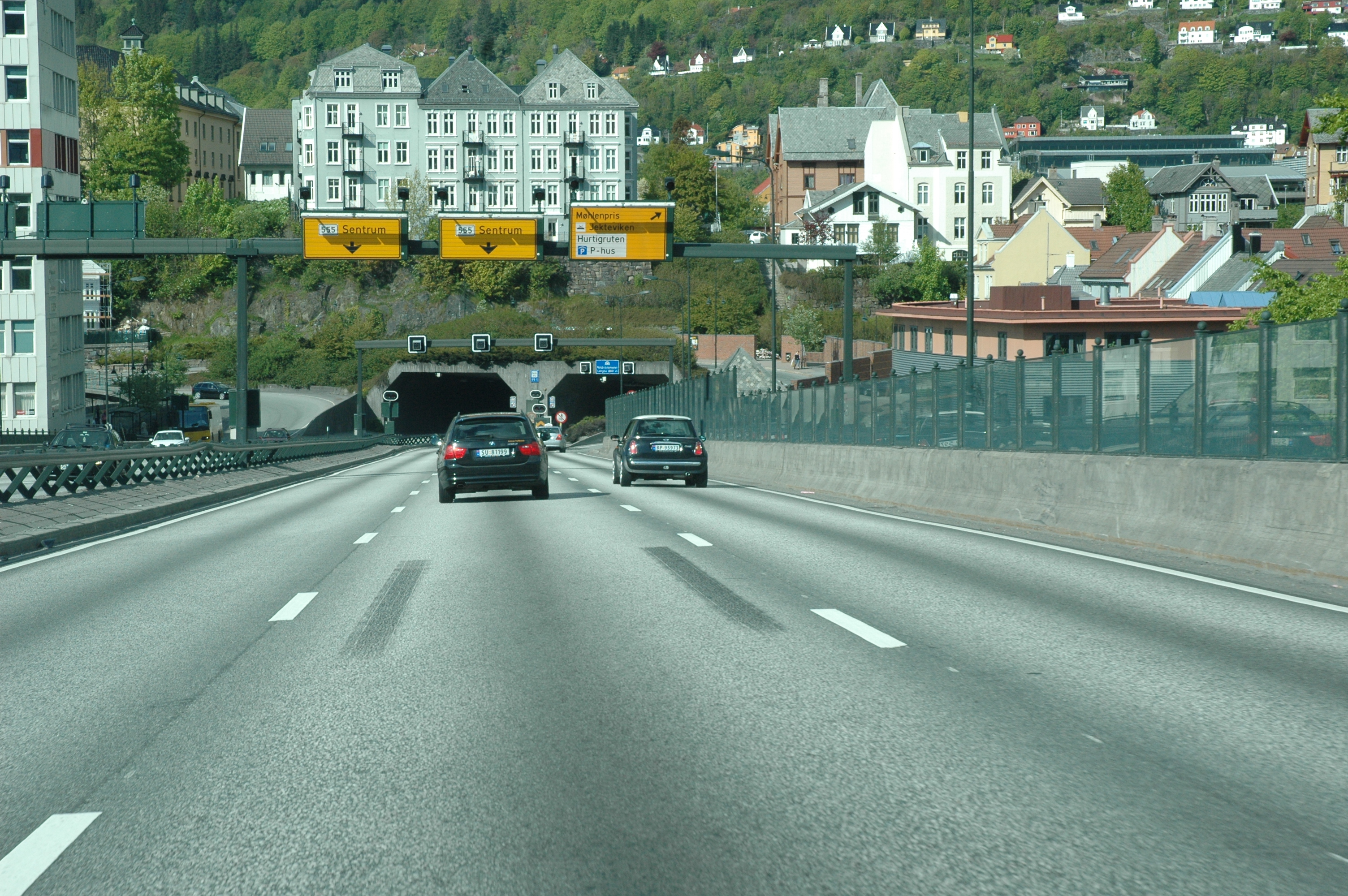 Over Puddefjordsbroen